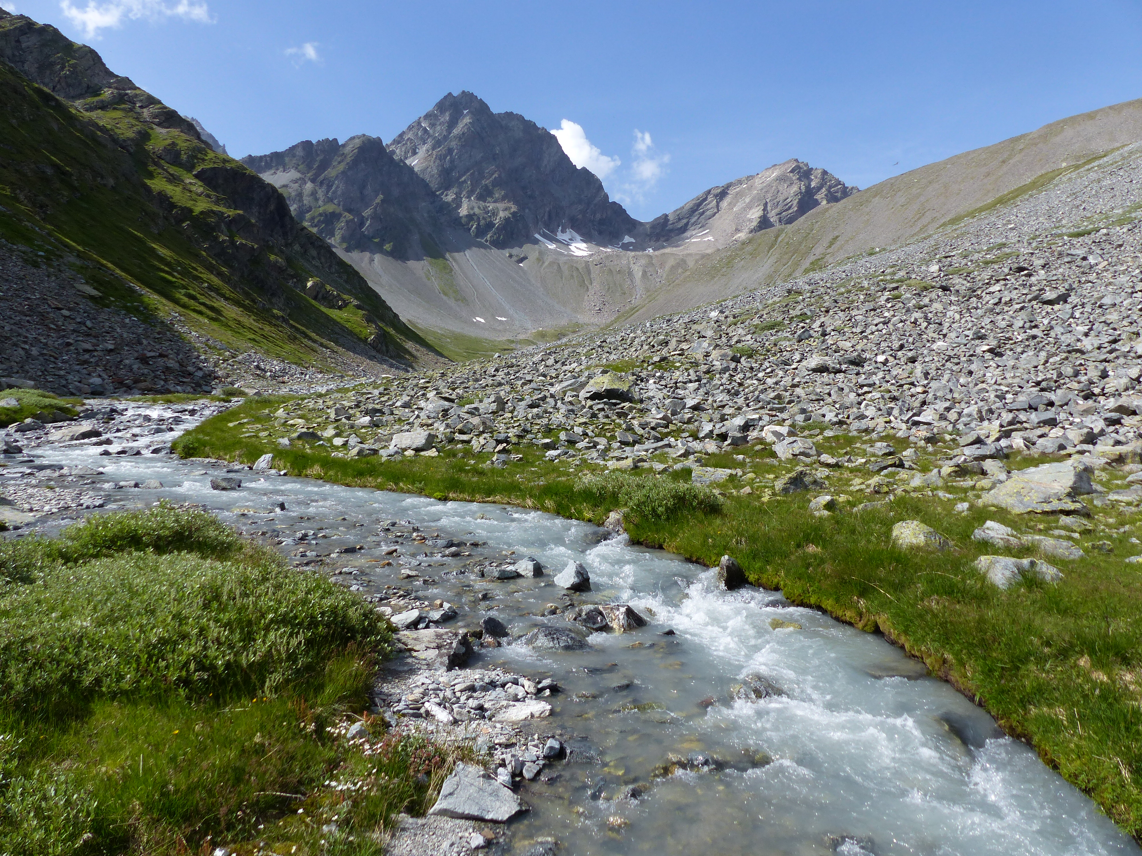 Aua da Sagliains mit Plattenhörnern